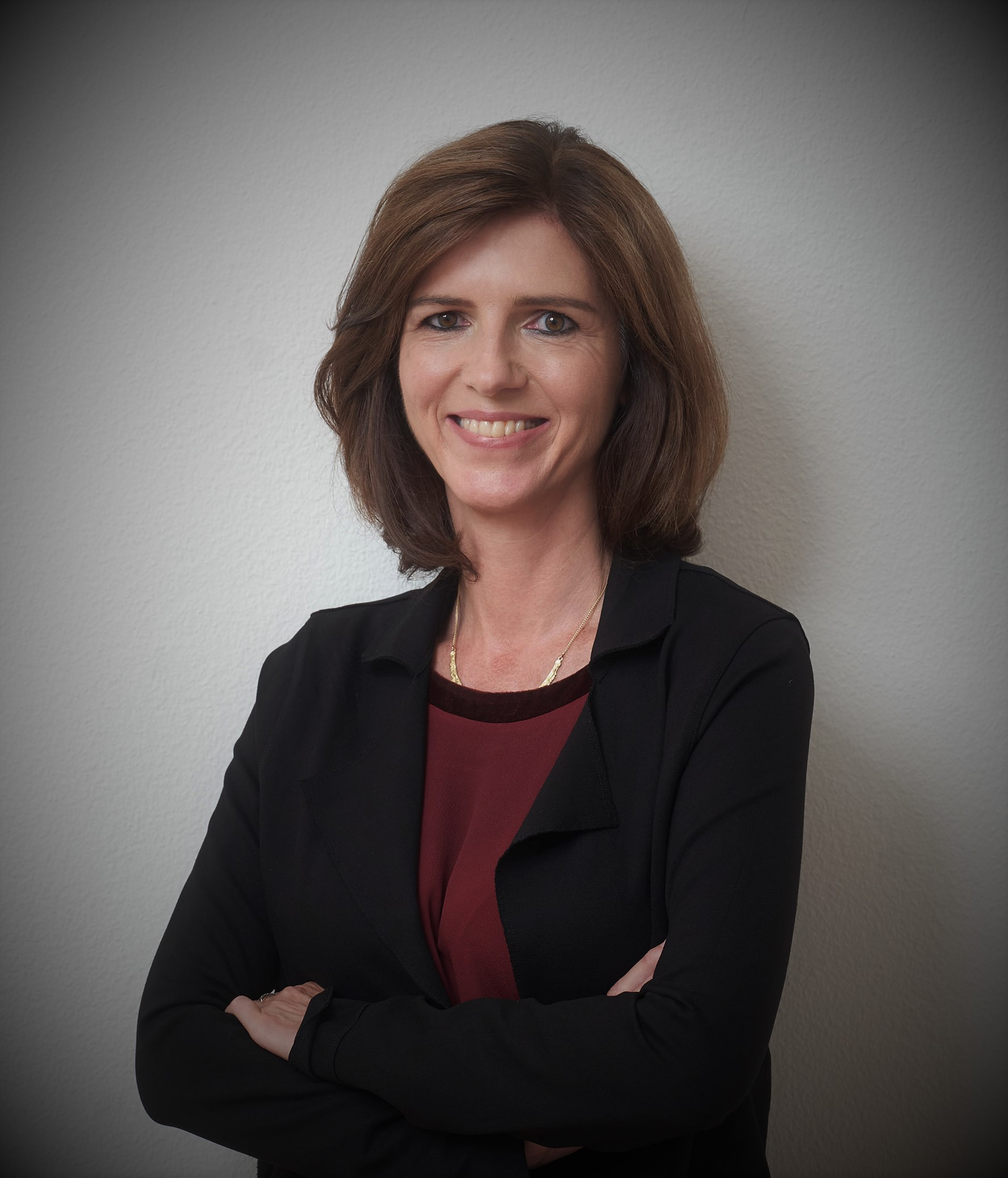 Andrea Büchler (2016)